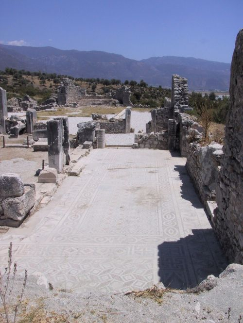 Calle de de la ciudad de Janto, en Turquía